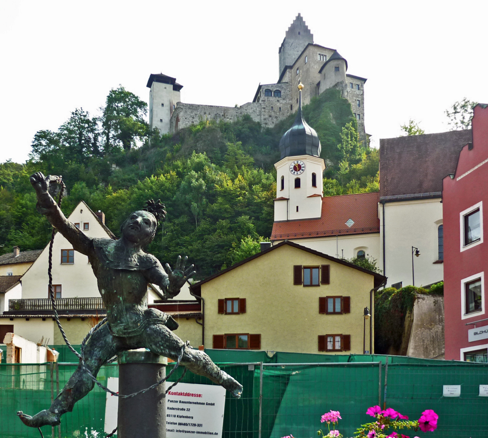 Blick vom Markt in Kipfenberg auf katholische Pfarrkirche und Burg Kipfenberg (mit Plastik Antidämon Fasenickl)This is a photograph of an architectural monument.